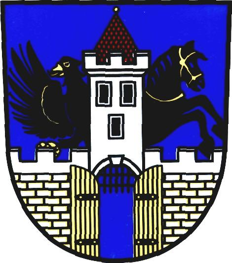 Znak obce Brodce